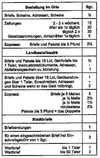 Soviel kostete 1852 die Zustellung in Orts-, Land, und Stadtgebiet